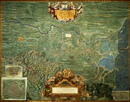 Il Ducato di Ferrara (Ferrariae Ducatus) nella mappa n° 275 della Galleria delle carte geografiche dei Musei Vaticani a Roma. Nella mappa è rappresentato l'assedio della Mirandola di Papa Giulio II della Rovere del 1511